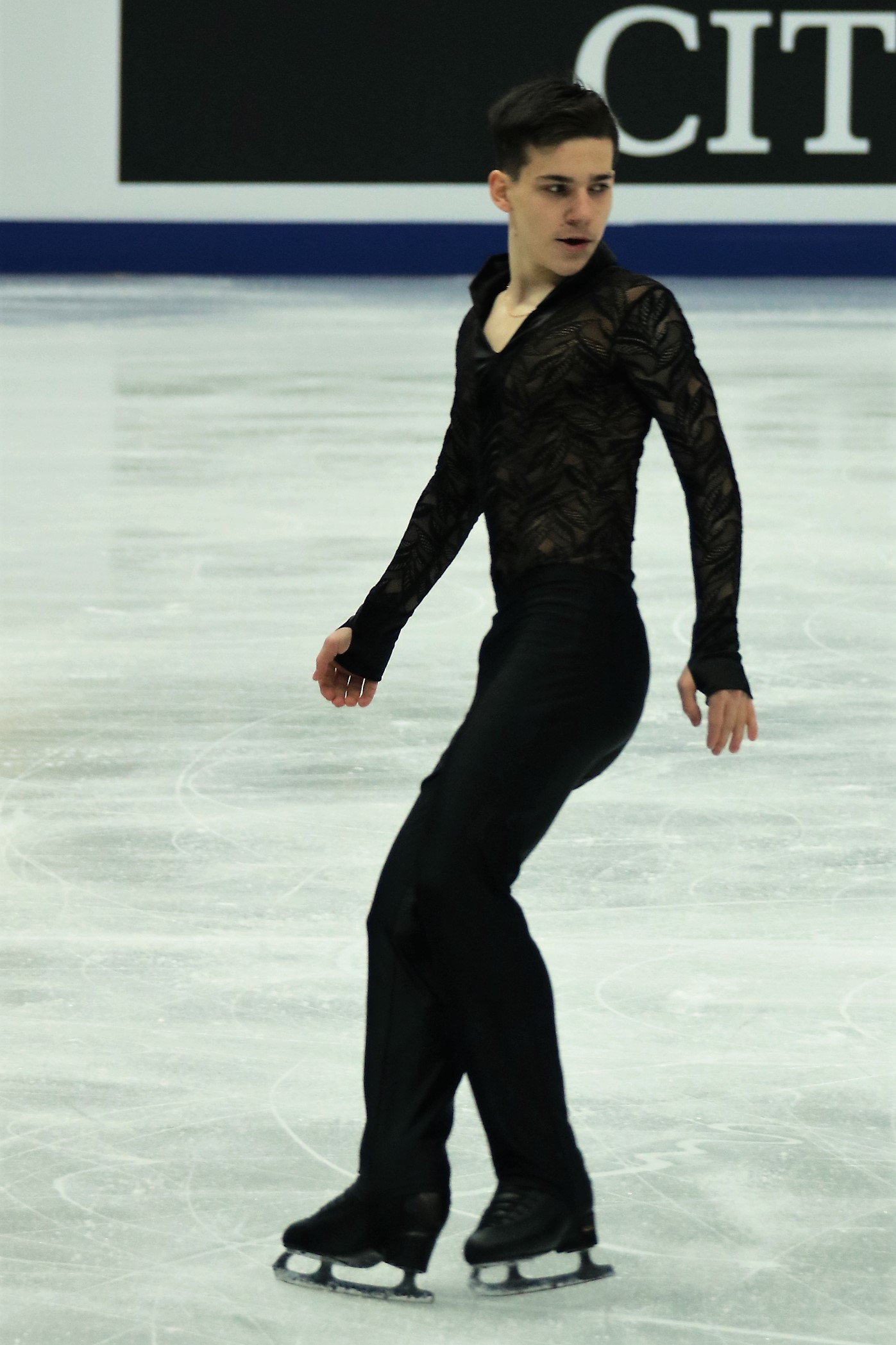 Ираклий Майсурадзе (Грузия) на Чемпионате Европы по фигурному катанию 2018.